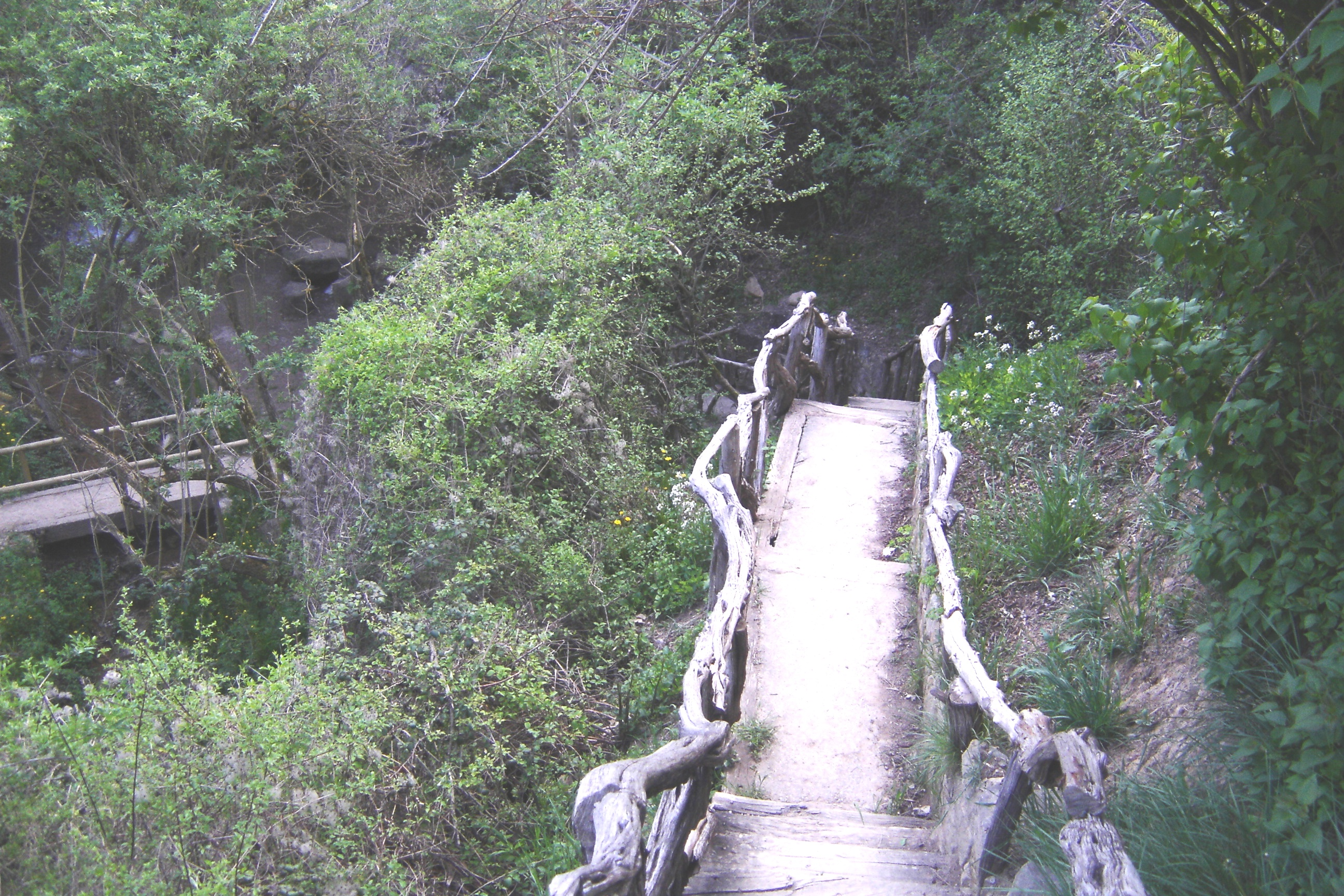 Escales per baixar a la font de la Mina, a Solsona (Solsonès)